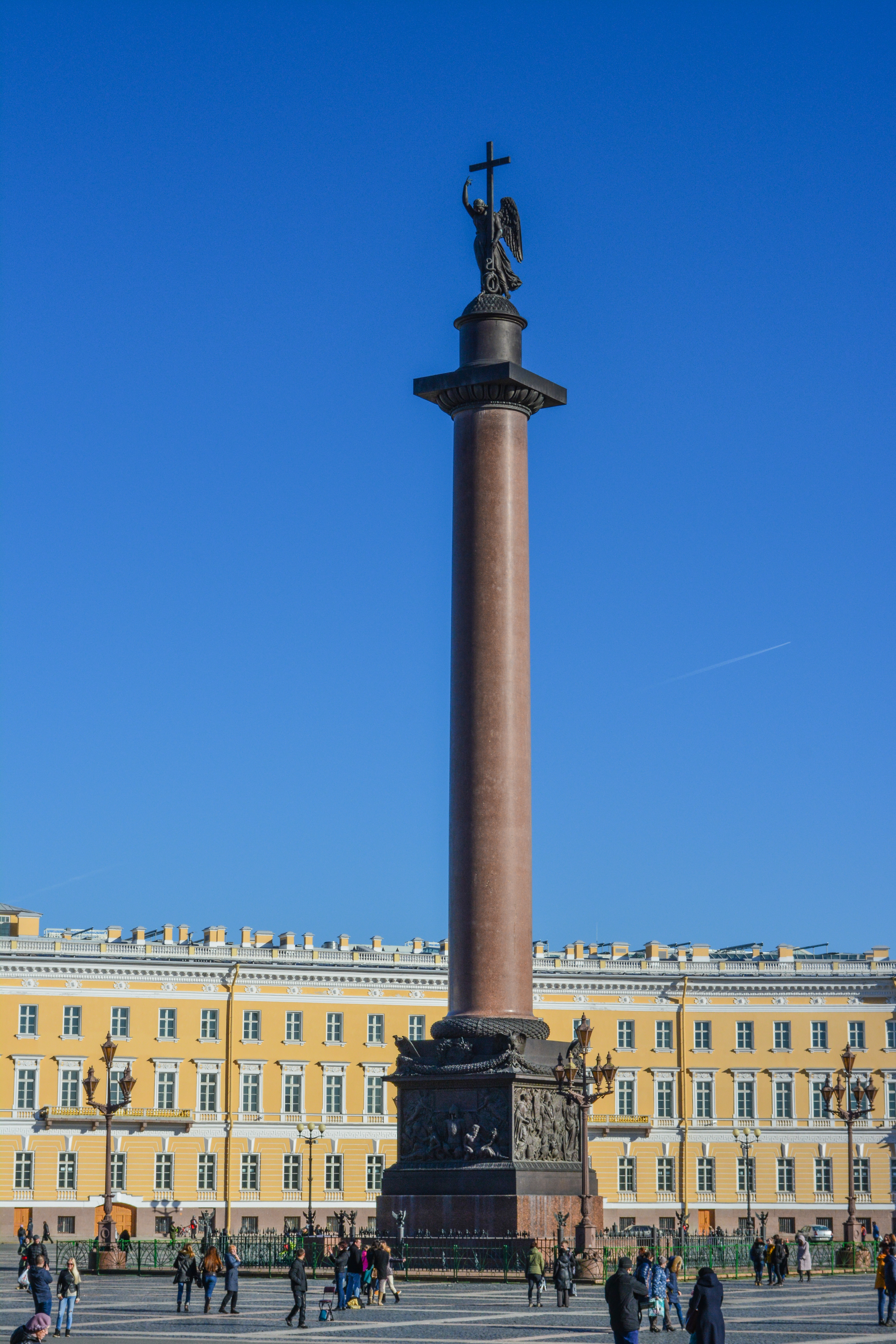 Александровская колонна (Санкт-Петербург и Лен.область, Санкт-Петербург, Дворцовая площадь)